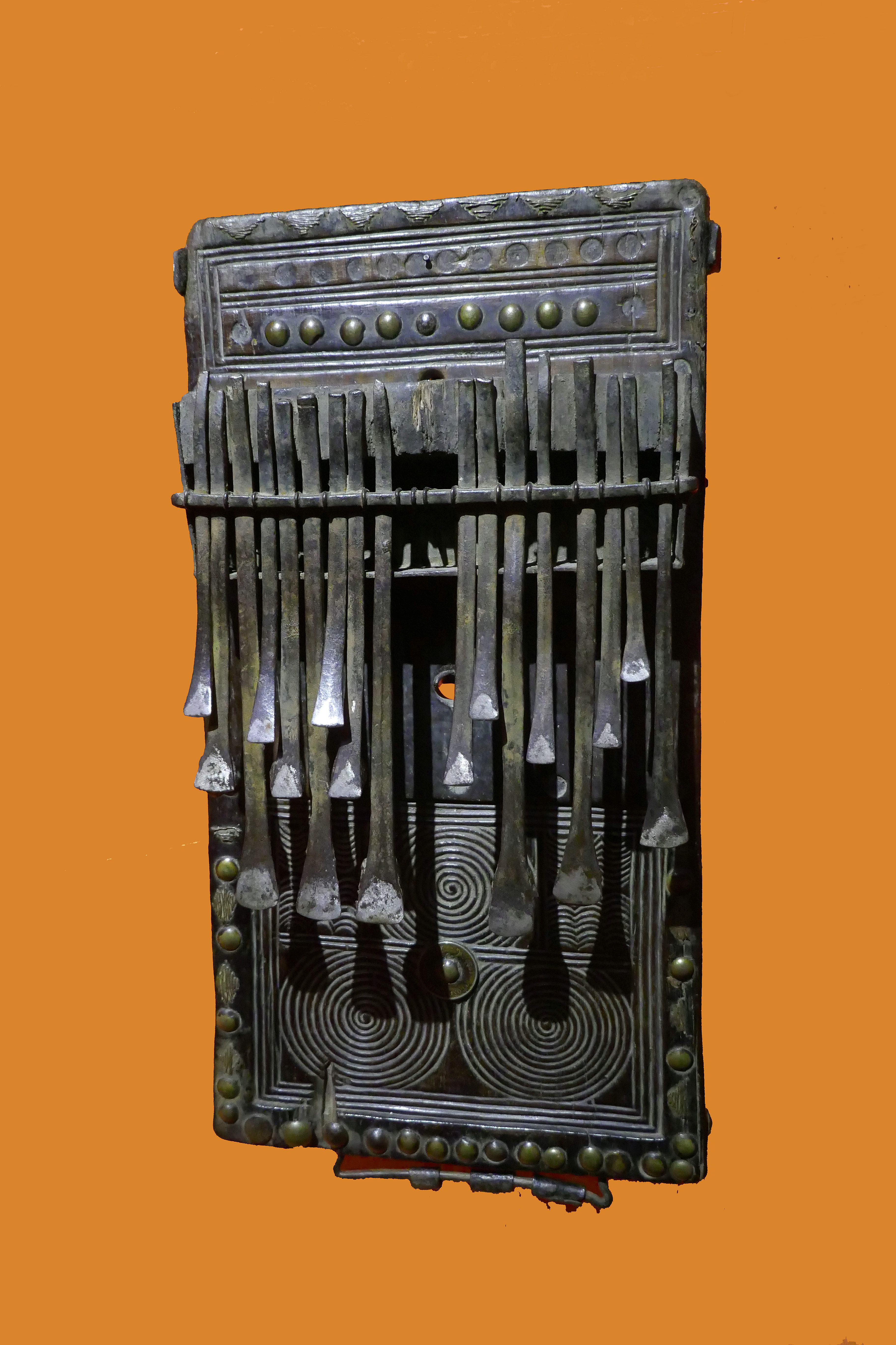 Lamellophone chisonji Artiste inconnu Population Tshokwe Angola Fin du 19e siècle Bois, fer Musical Instrument Museum, Phoenix Objet présenté lors de l'exposition Frapper le fer. L'art des forgerons africains au musée du quai Branly Jacques Chirac.